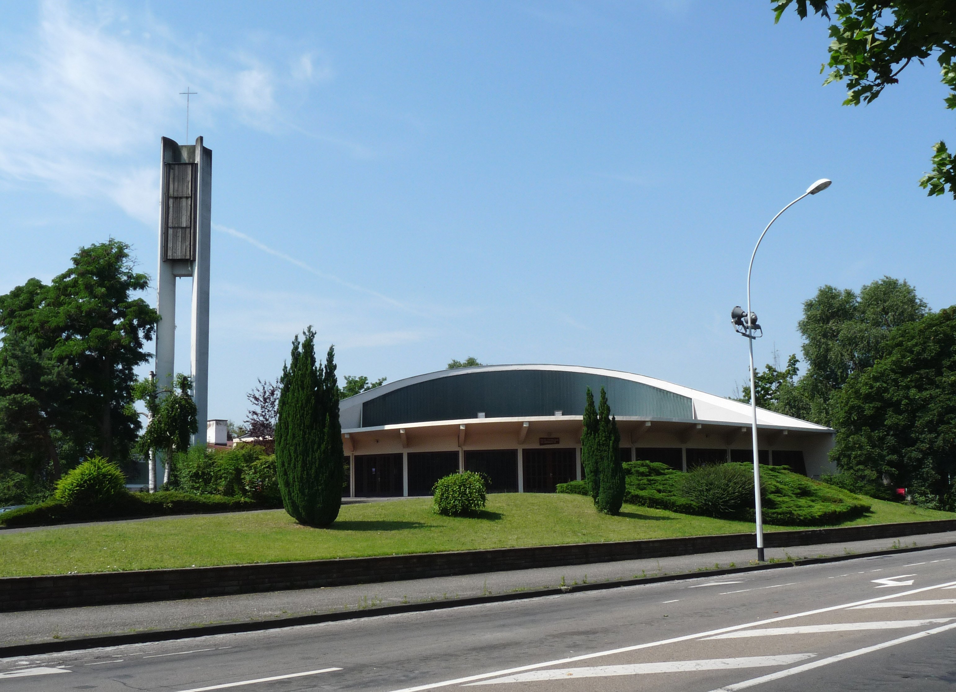 Eglise catholique (Sainte-Bernadette) de la Cité de l'Ill, Strasbourg